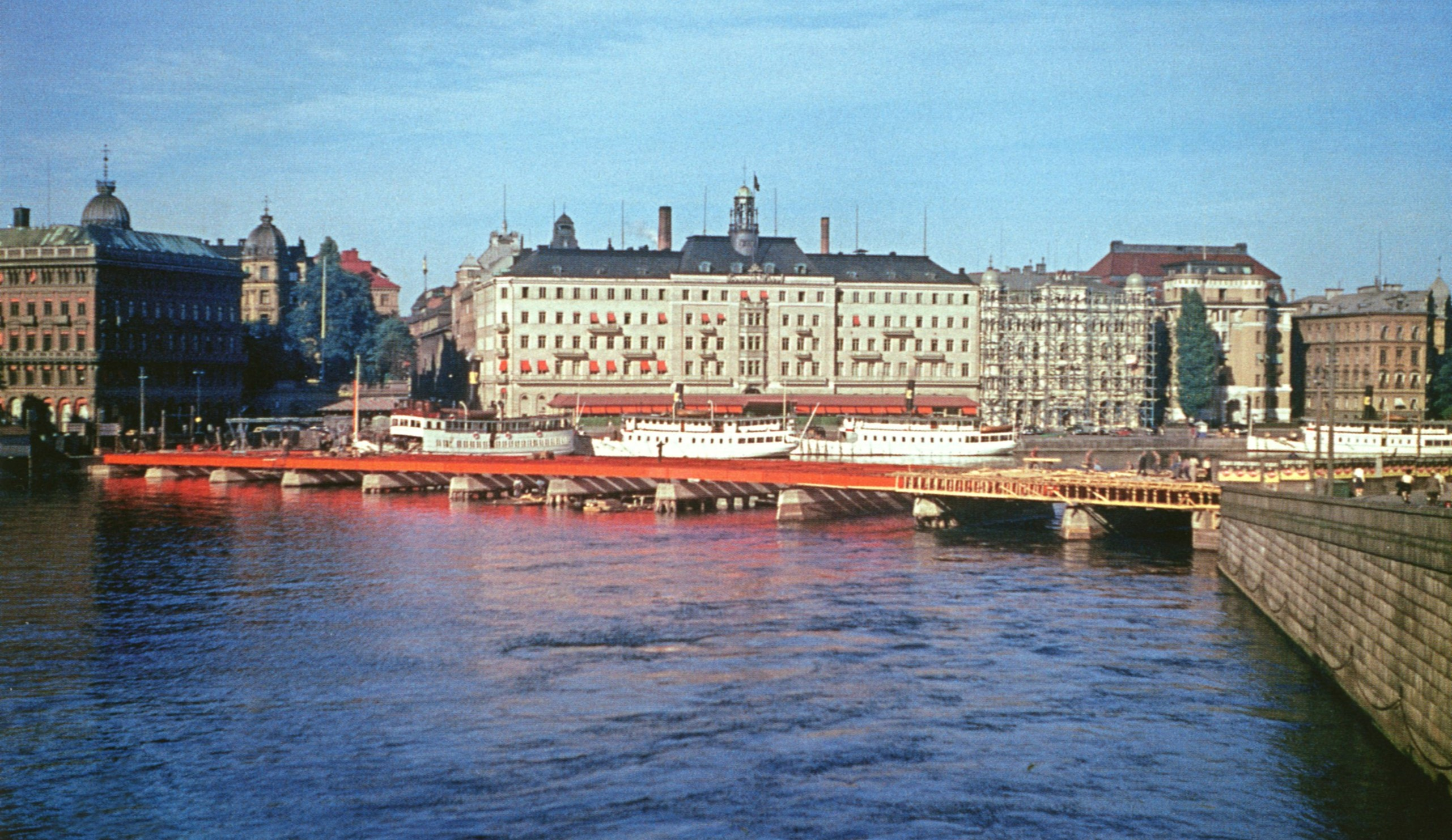 Strömbron i Stockholm under uppförande